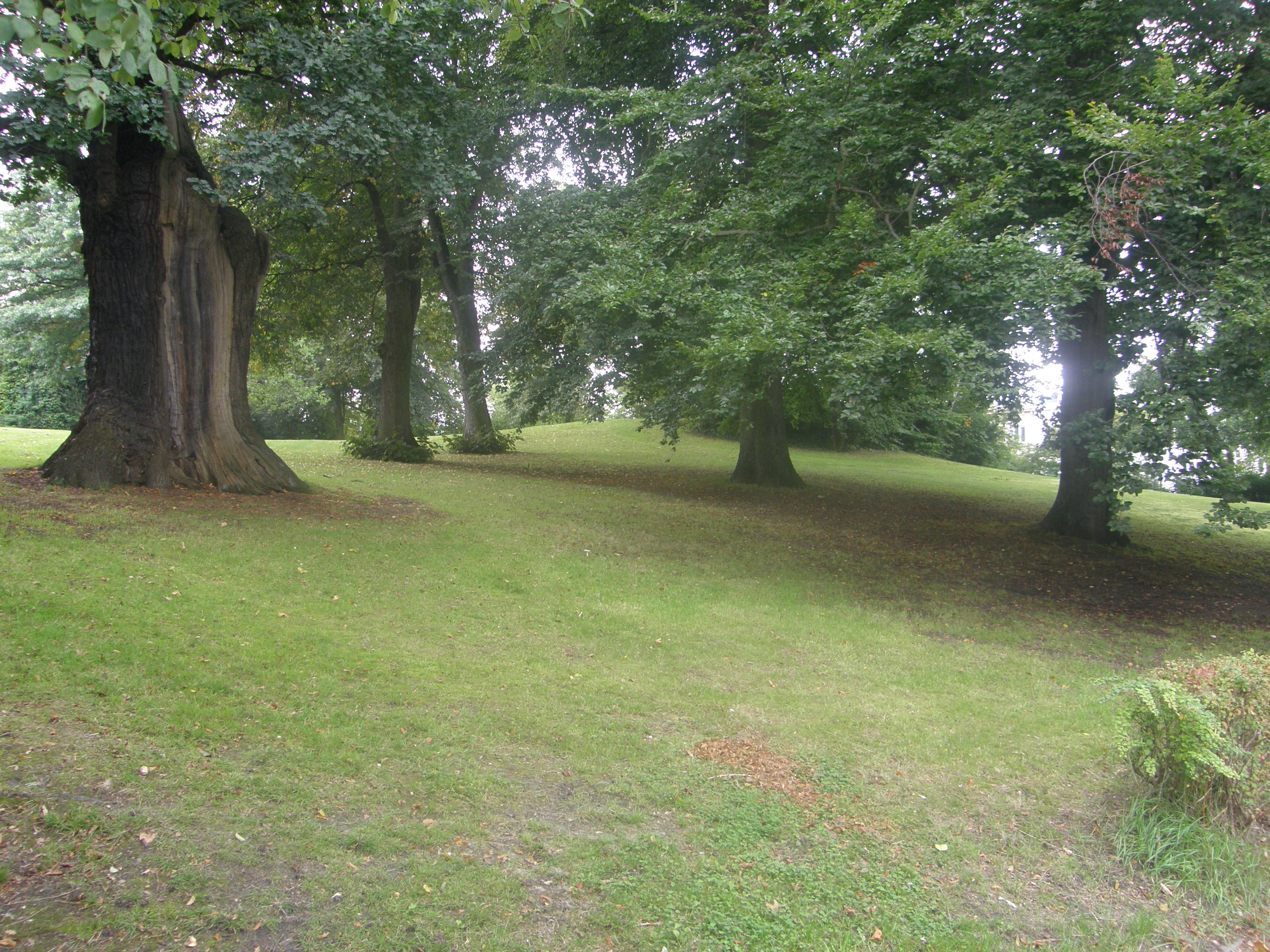 harvestehuder weg hamburg licentiatenberg